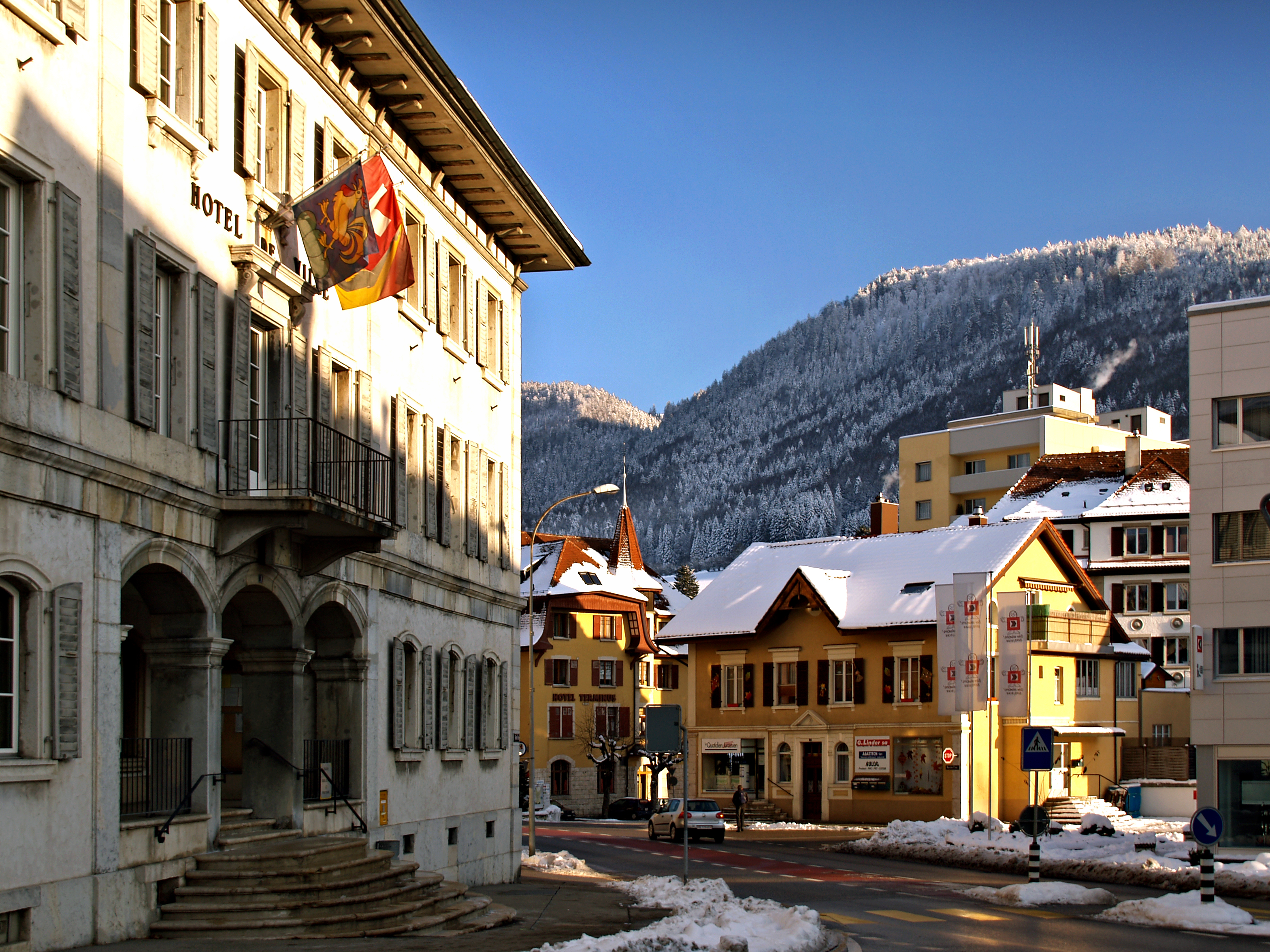 Tavannes, Berne (Suisse) - Hôtel de ville